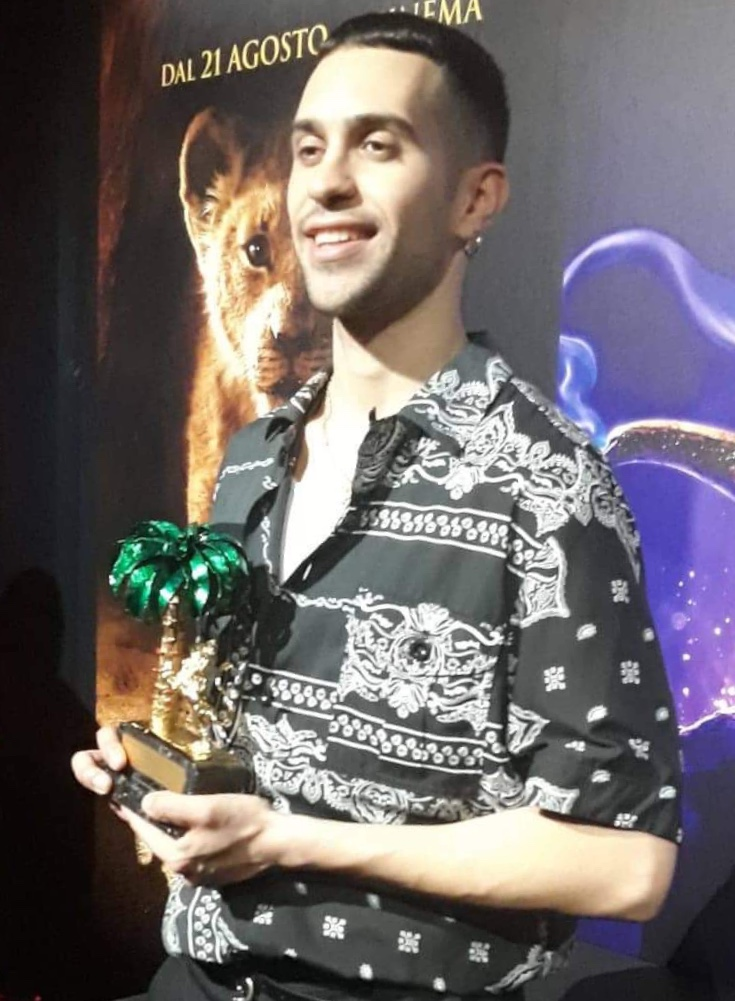 Italian singer Mahmood